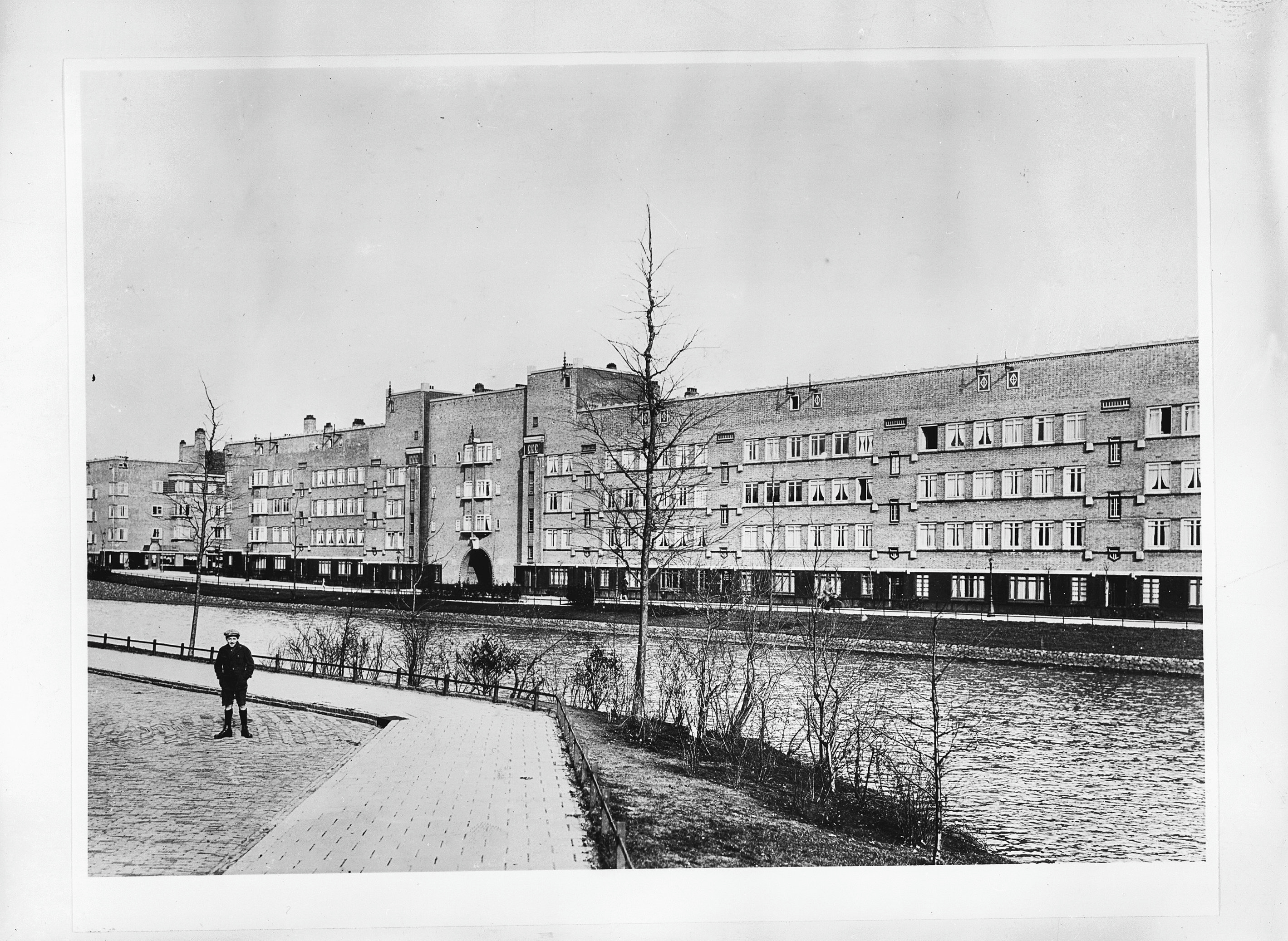 moderne flatwoningen, complex "Olympia", aan de Olympiakade, nummers 32-51, tussen de Marathonweg (links) en de Turnerstraat, met poortje naar de Simsonstraat, gezien vanaf de Pieter Lastmankade over het Noorder Amstelkanaal.